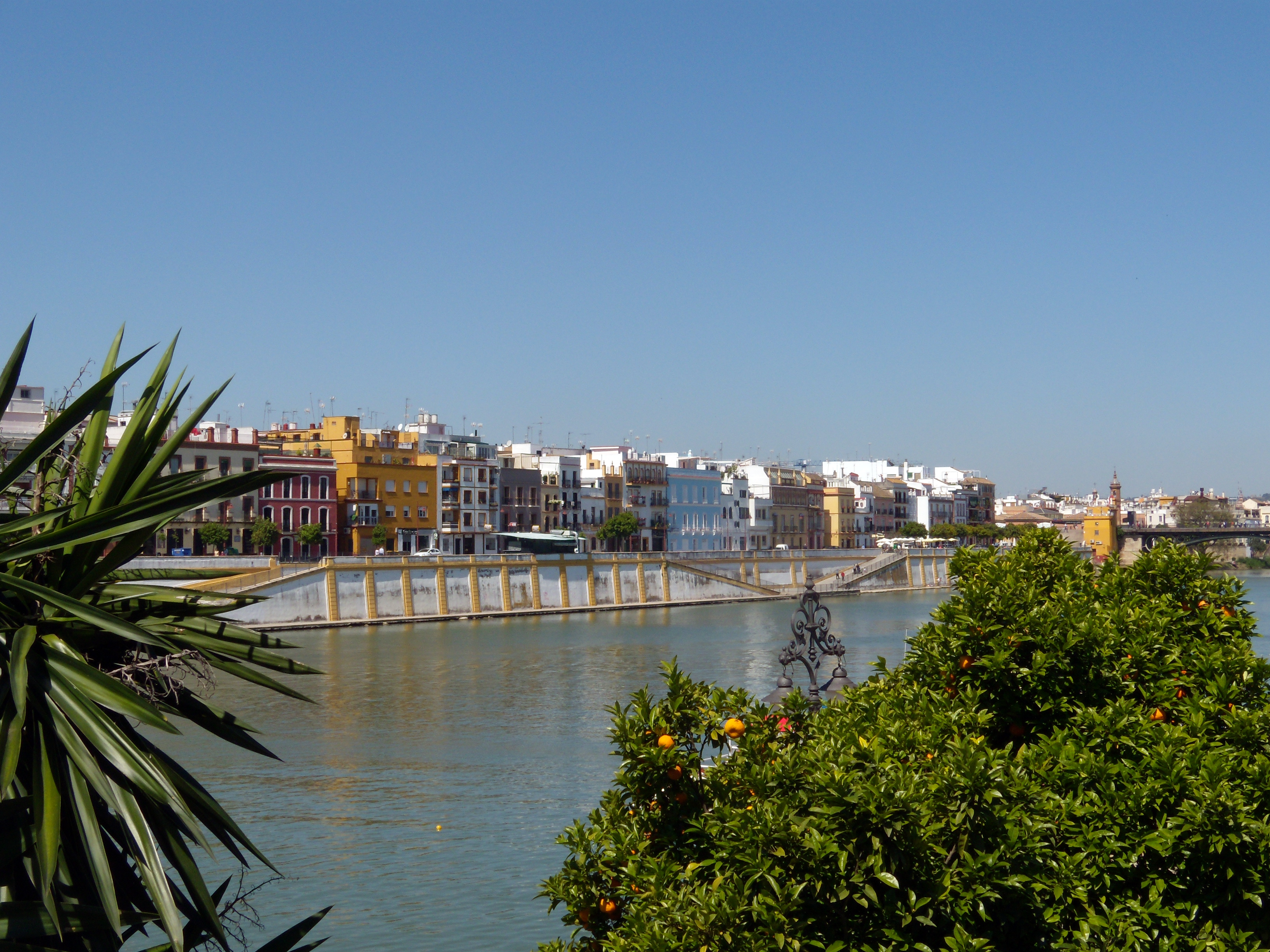 Séville (Espagne) : la darse du Guadalquivir et la rue Betis du quartier de Triana, vus depuis la rive gauche.